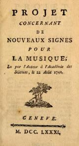 1er page du livre